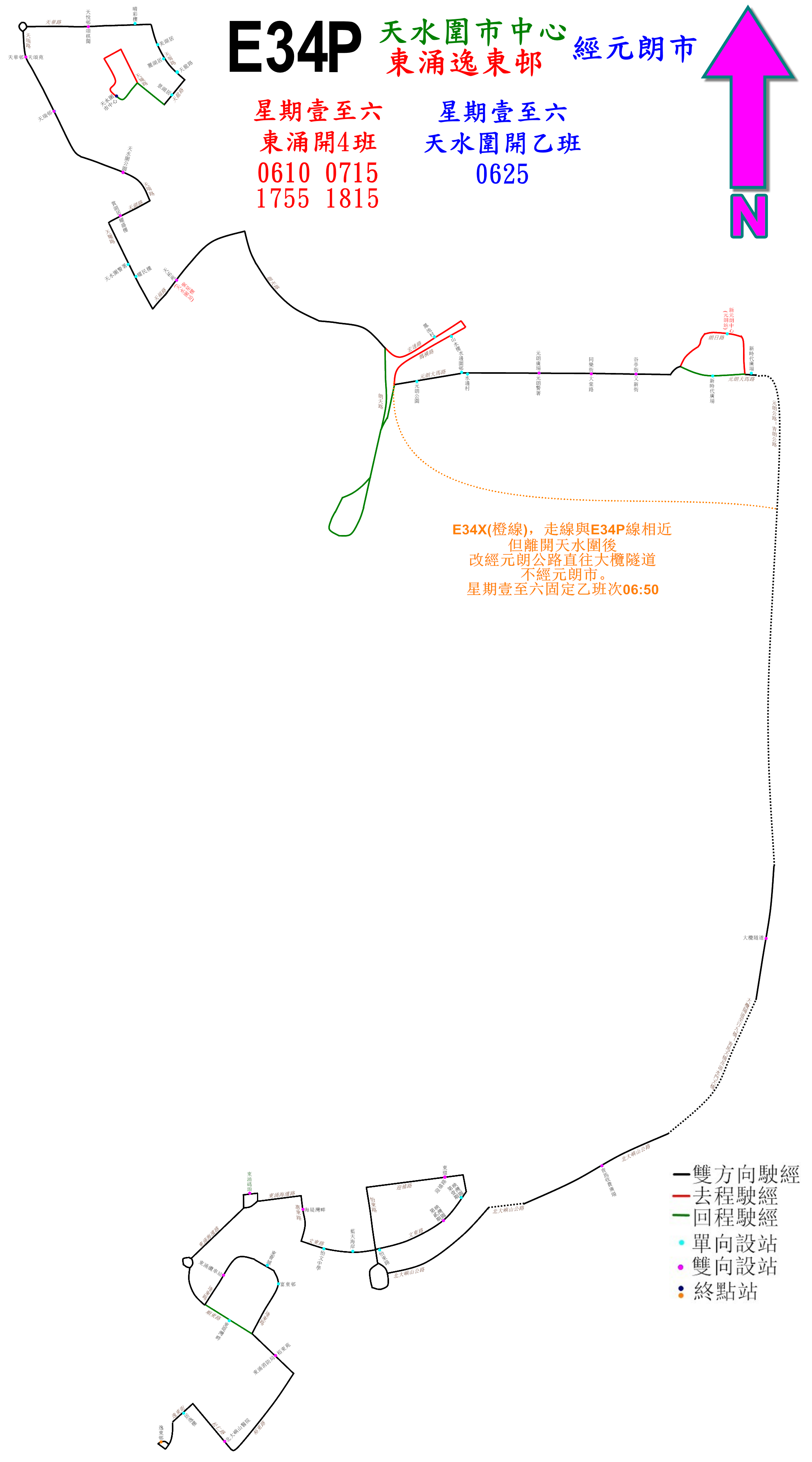 中文（香港）: 龍運巴士e34p線的走線圖